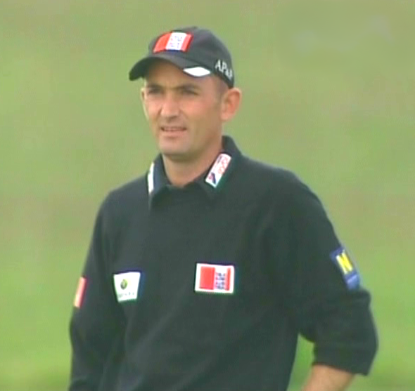 Bildbeschreibung: Markus Brier bei den Austrian Open 2006 Quelle: eigene Aufnahme mit einer Handycam Fotograf/Zeichner: Boss 15:50, 11 June 2006 (UTC) Datum: 10.6.2006 Sonstiges: GNU